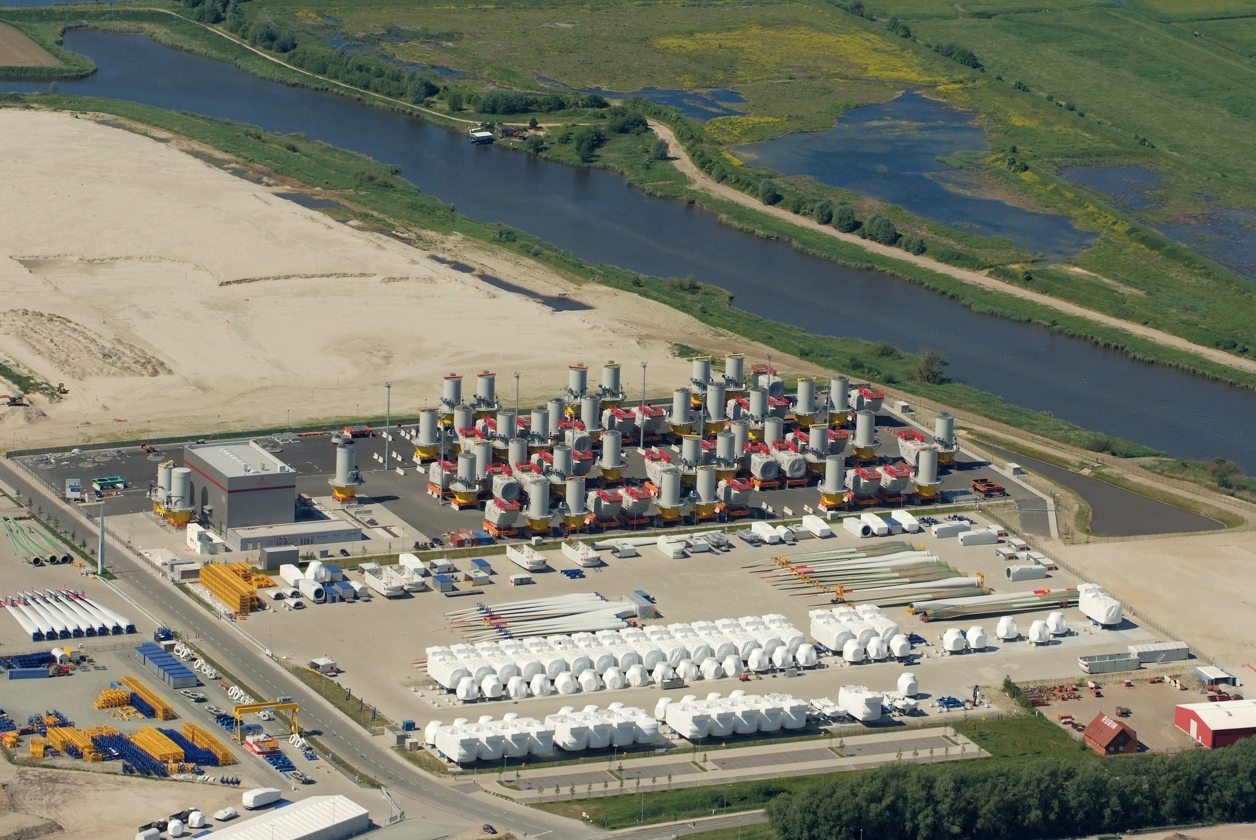 RePower-Gelände in Bremerhaven Fotoflug vom Flugplatz Nordholz-Spieka über Cuxhaven und Wilhelmshaven